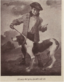 Catalan: El noi del gos.